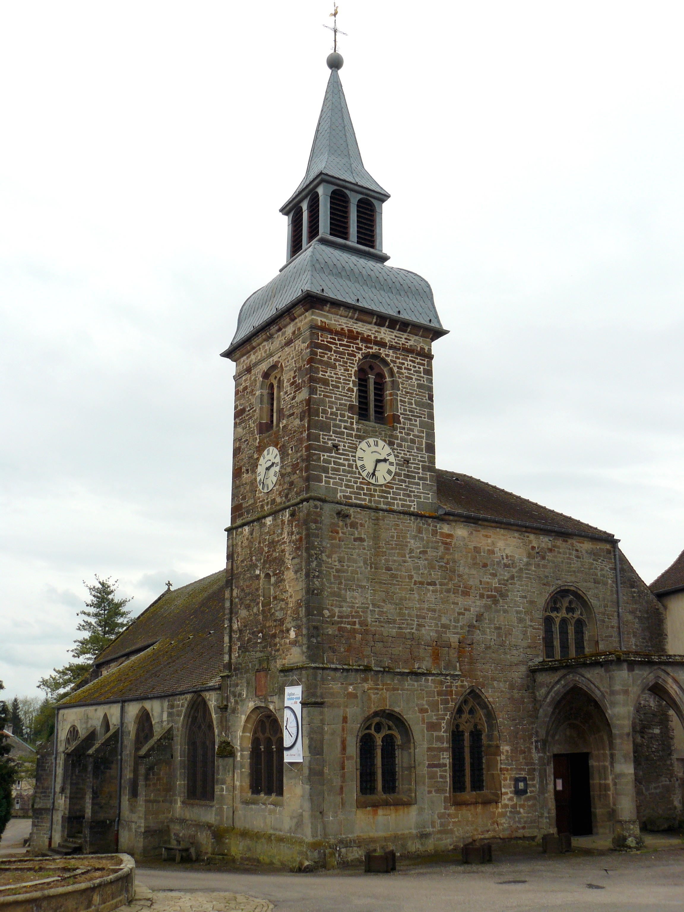 L'église de Jonvelle (Haute-Saône, France)